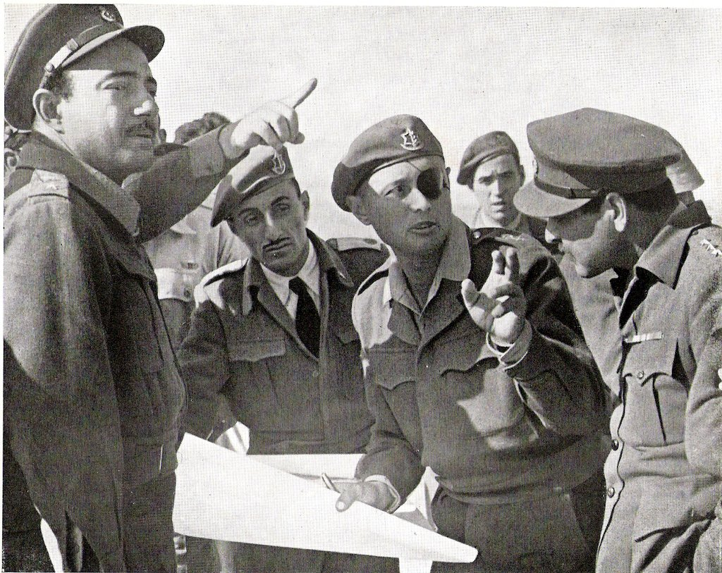 ועדת שביתת הנשק ישראל-מצרים קובעת את תוואי הגבול.